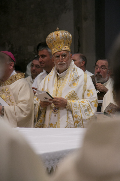 l'eparca Donato Oliverio di Lungro degli Italo-Albanesi